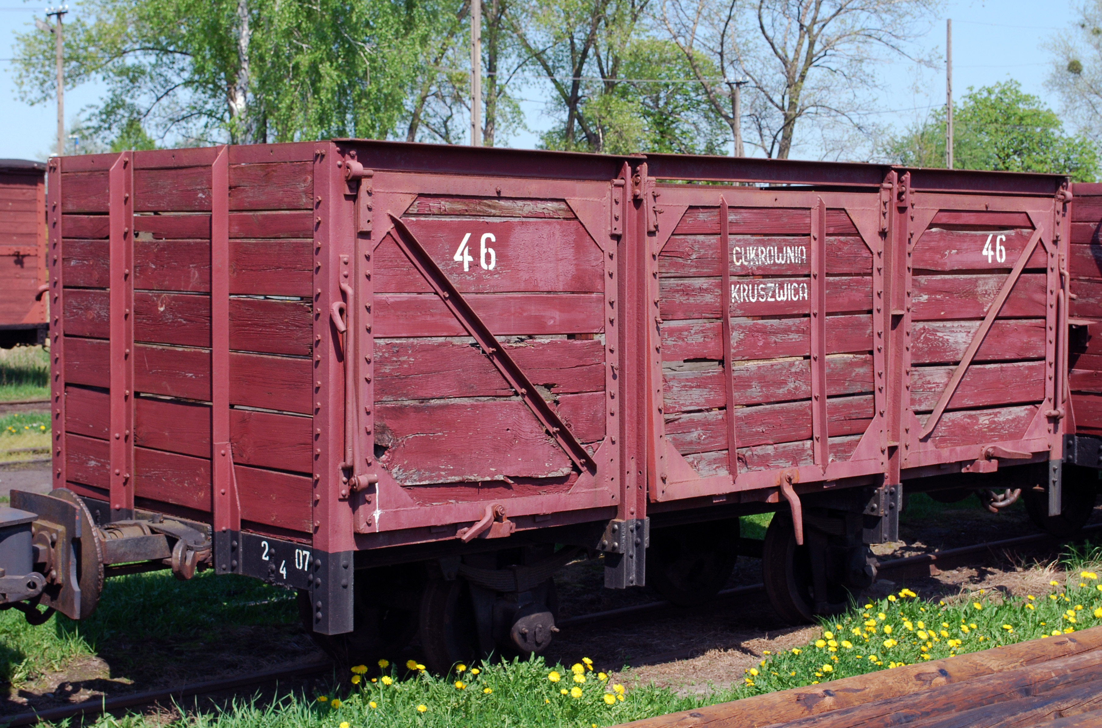 Rogowska Kolej Wąskotorowa Wagon do przewozu buraków cukrowych.